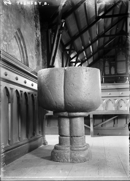 Dopfunt av täljsten i två stycken. Cuppa i fyrpassform, slät, med uttömningshål. Hals och fot även i fyrpass. Målad med oljefärg. 1800-talet (?) Snabbinv. Kategori: (04) Dopfuntar Dopfunt av täljsten i två stycken. Cuppa i fyrpassform, slät, med uttömningshål. Hals och fot även i fyrpass. Målad med oljefärg. 1800-talet (?) Snabbinv.